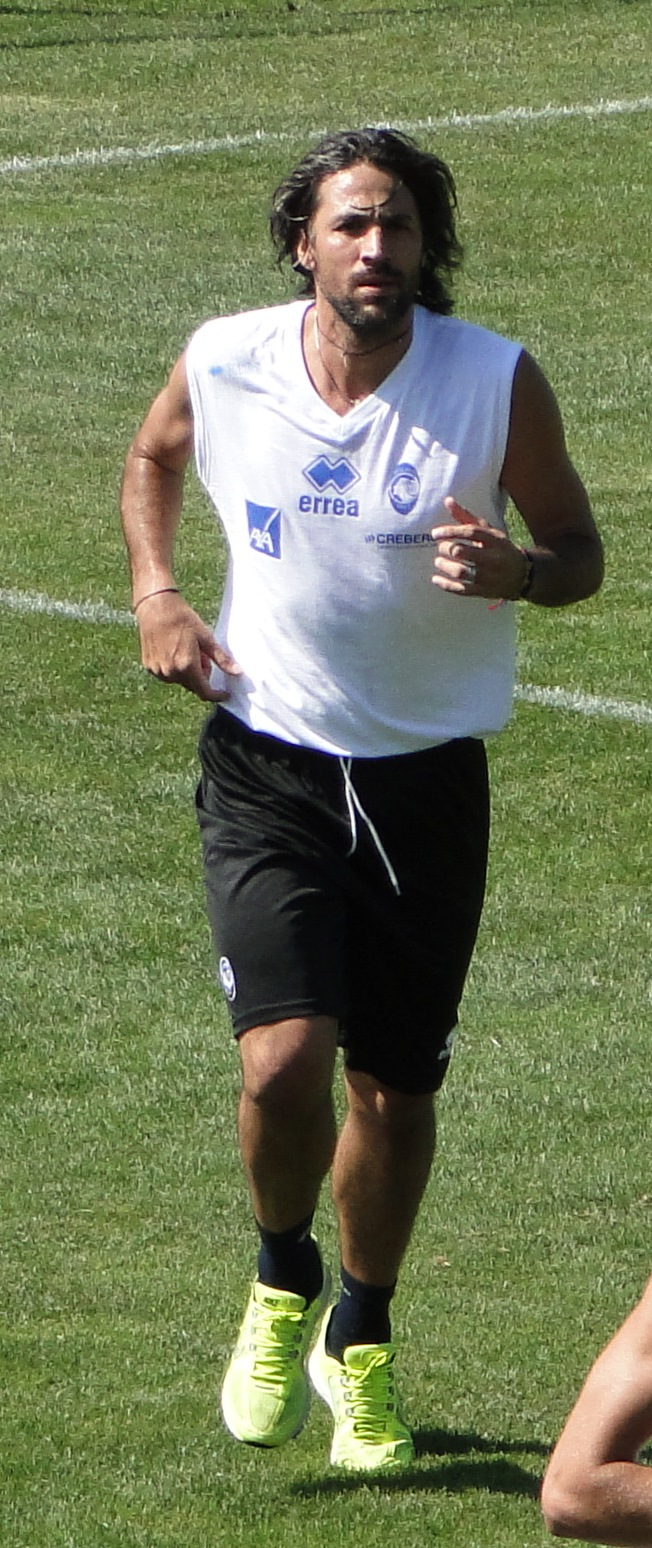 Mario Yepes, colombian footballer